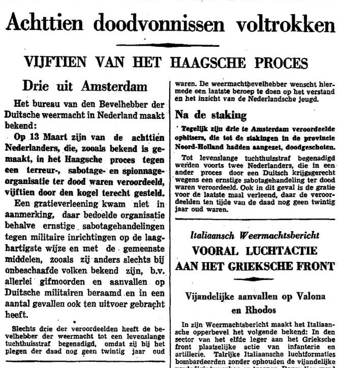 Voorpagina Het Vaderland van 14 maart 1941 met als openingsartikel de executie van de 15 Geuzen en 3 februaristakers